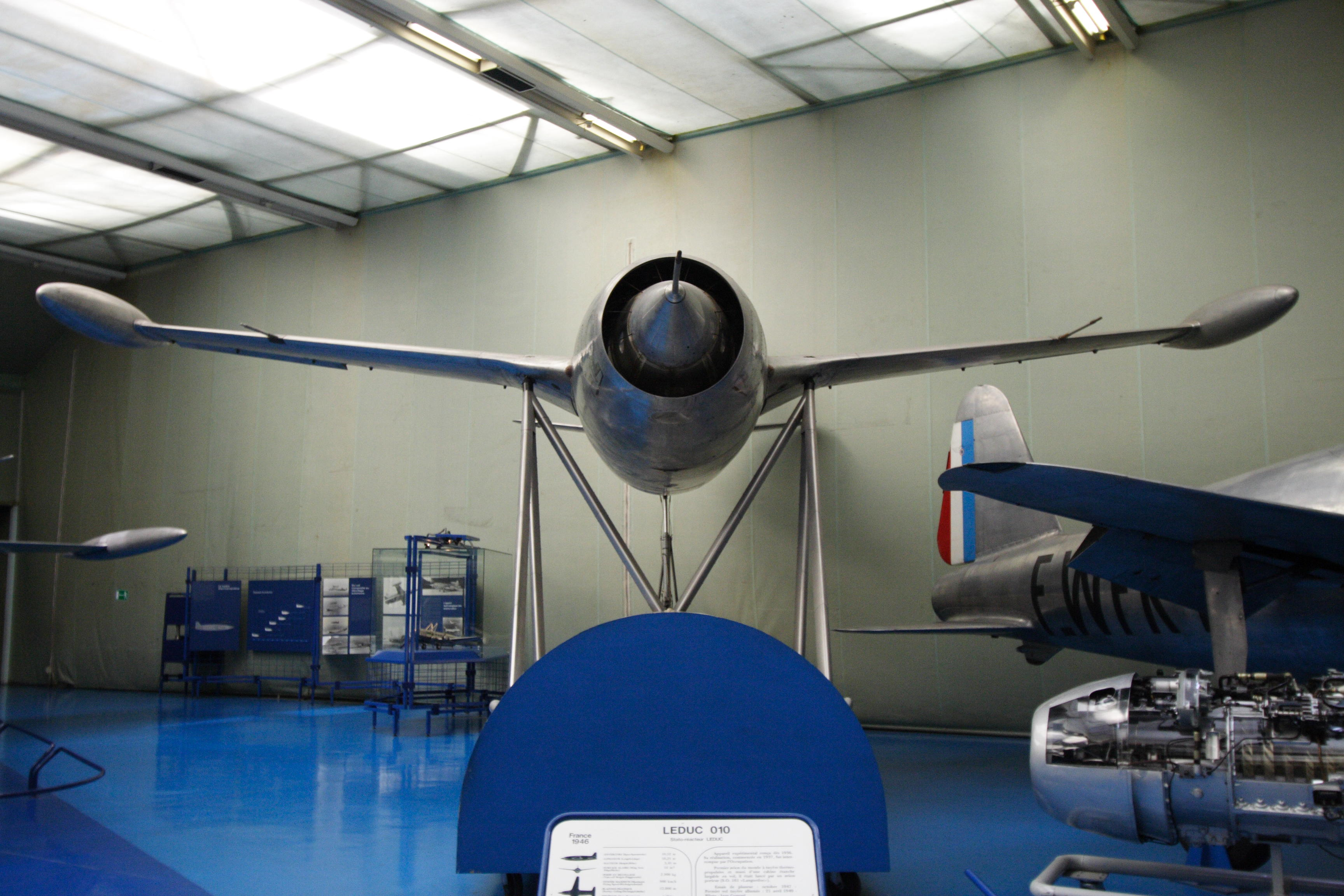 French experimental aircraft Leduc 010 with aerial launcher (Musée de l'air et de l'espace, Le Bourget, France)